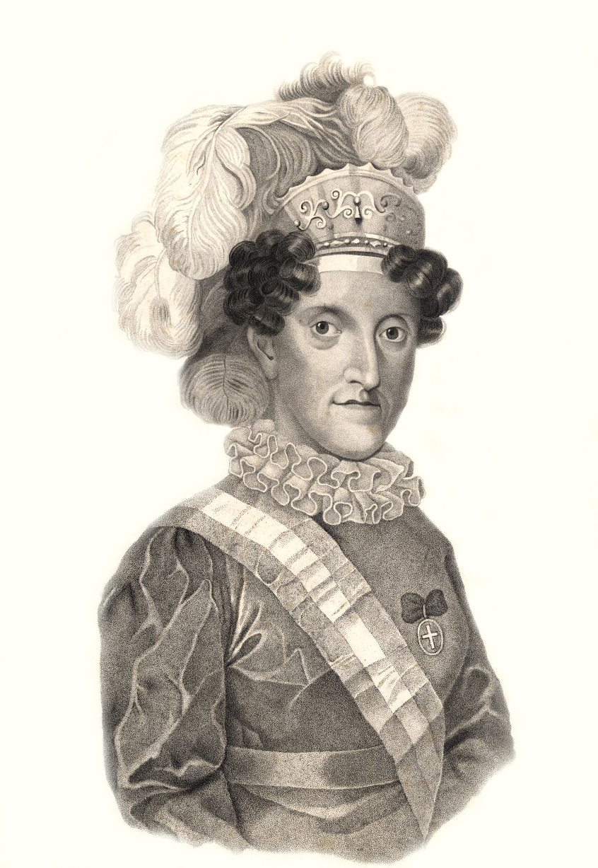 Carlota Joaquina de Bourbon, imperatriz do Brasil, rainha de Portugal e Algarves